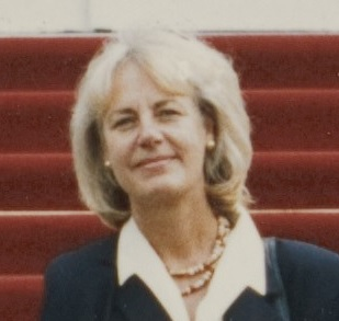 Minister van Volkshuisvesting, Ruimtelijke Ordening en Milieubeheer Margreeth de Boer